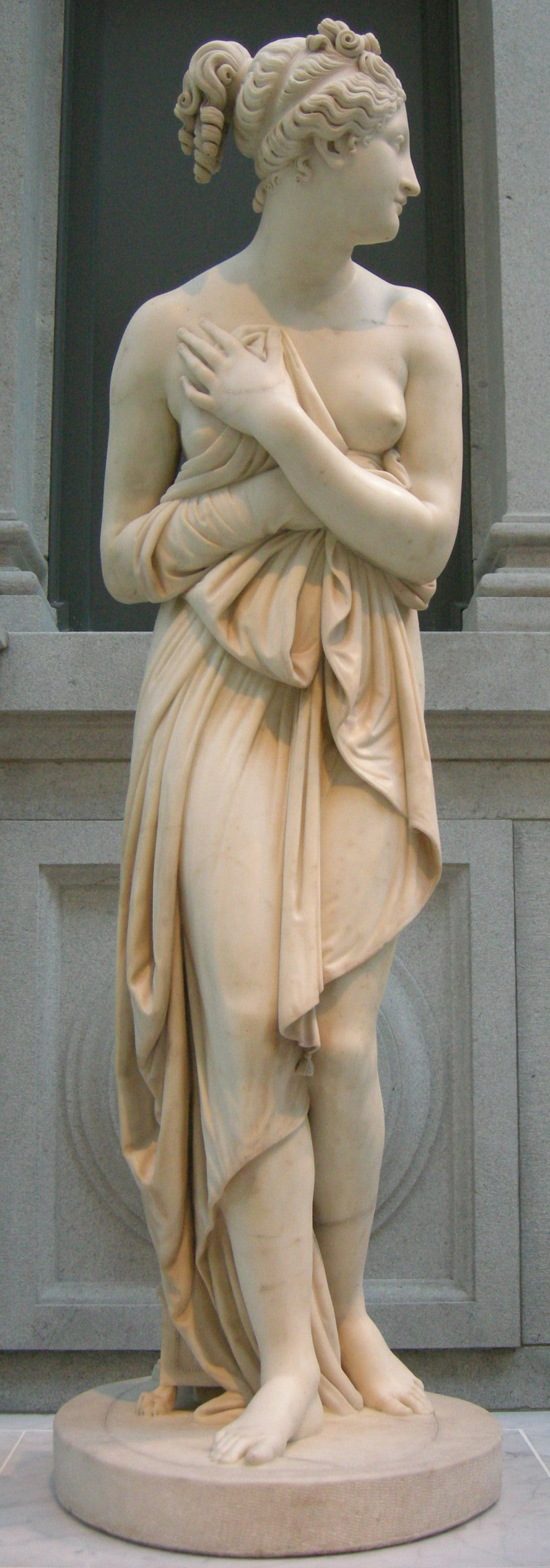 Antonio canova, venus, 1822-23 ca